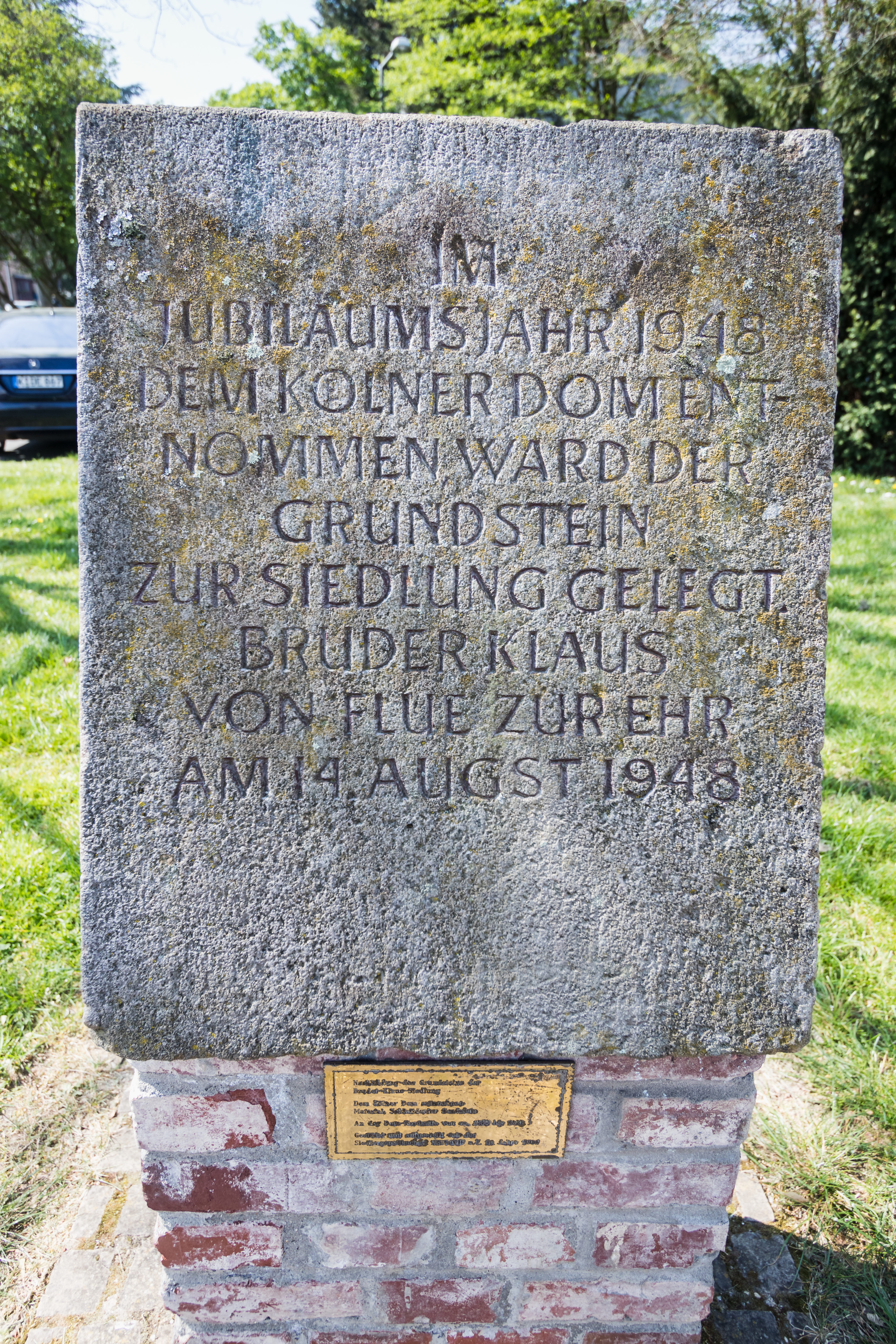 Grundstein der Bruder-Klaus-Siedlung in Köln-Mülheim von 1948. Ein Stück vom Kölner Dom. 14. August 1948